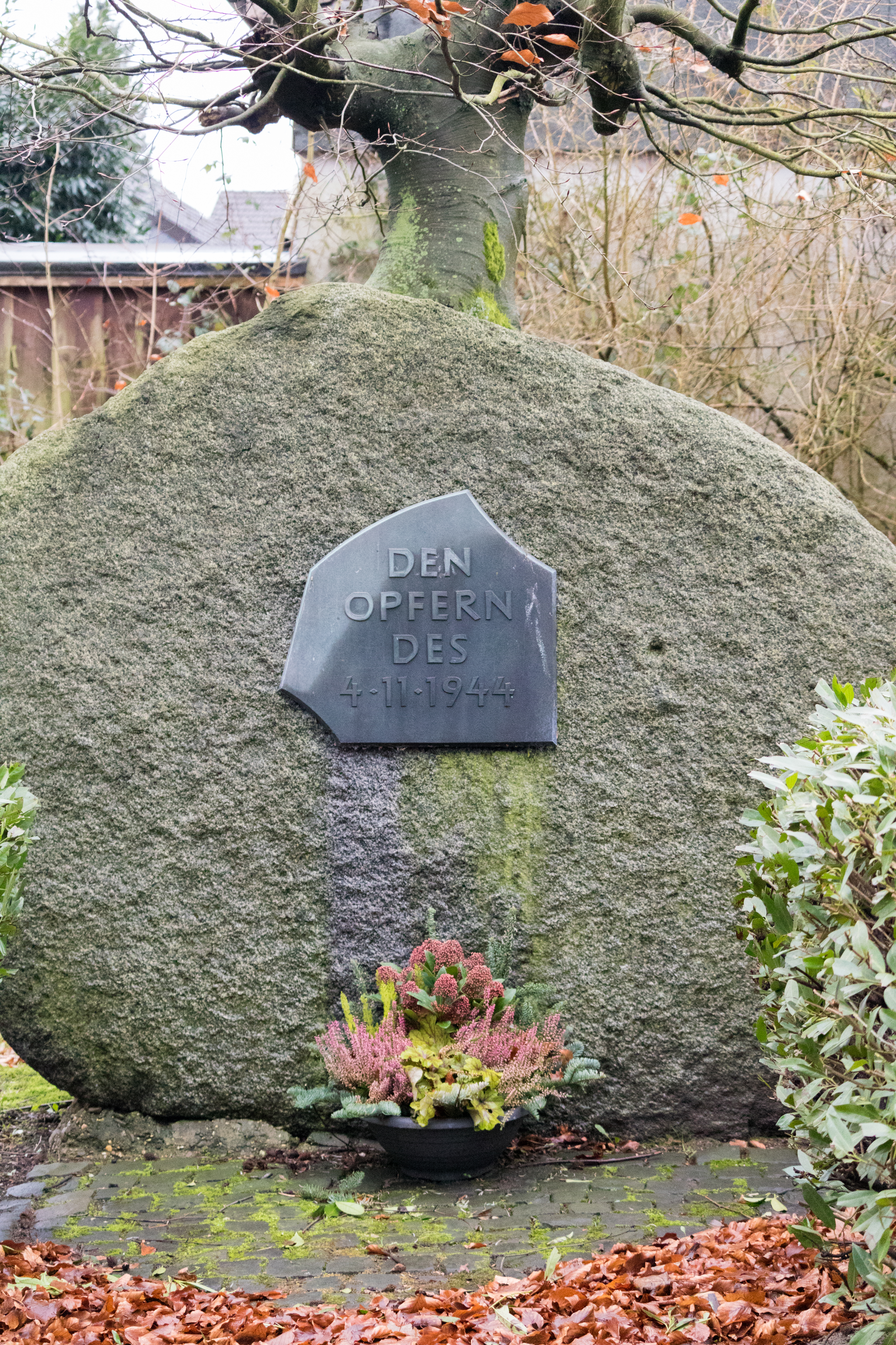 Mahnmal zur Erinnerung an die Opfer des alliierten Luftangriffs auf Hünger am 4. November 1944